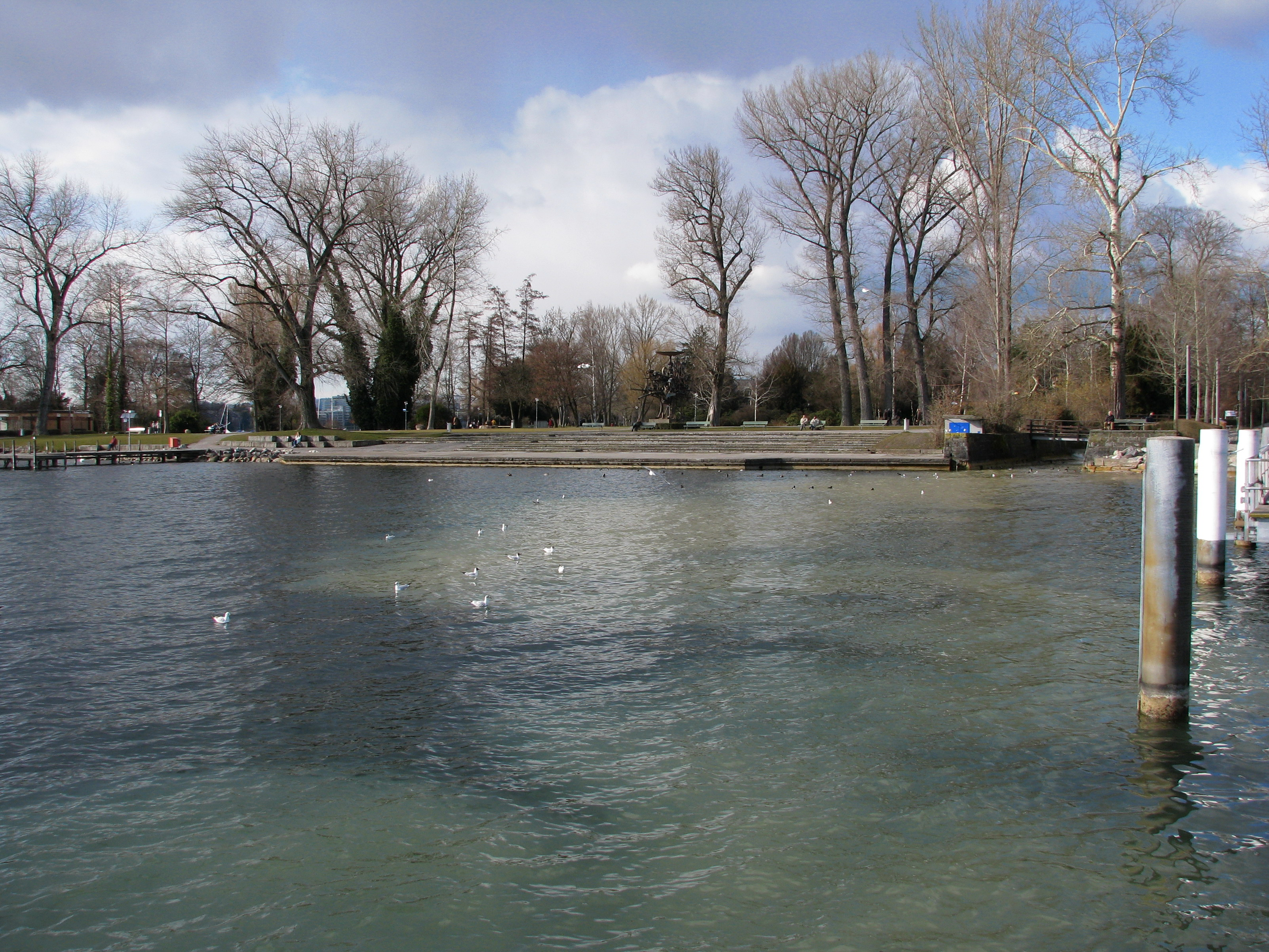 Zürich-Seefeld : Zürichhorn and Wehrenbach (Hornbach) as seen from Zürichsee-Schiffahrtsgesellschaft (ZSG) landing gate.